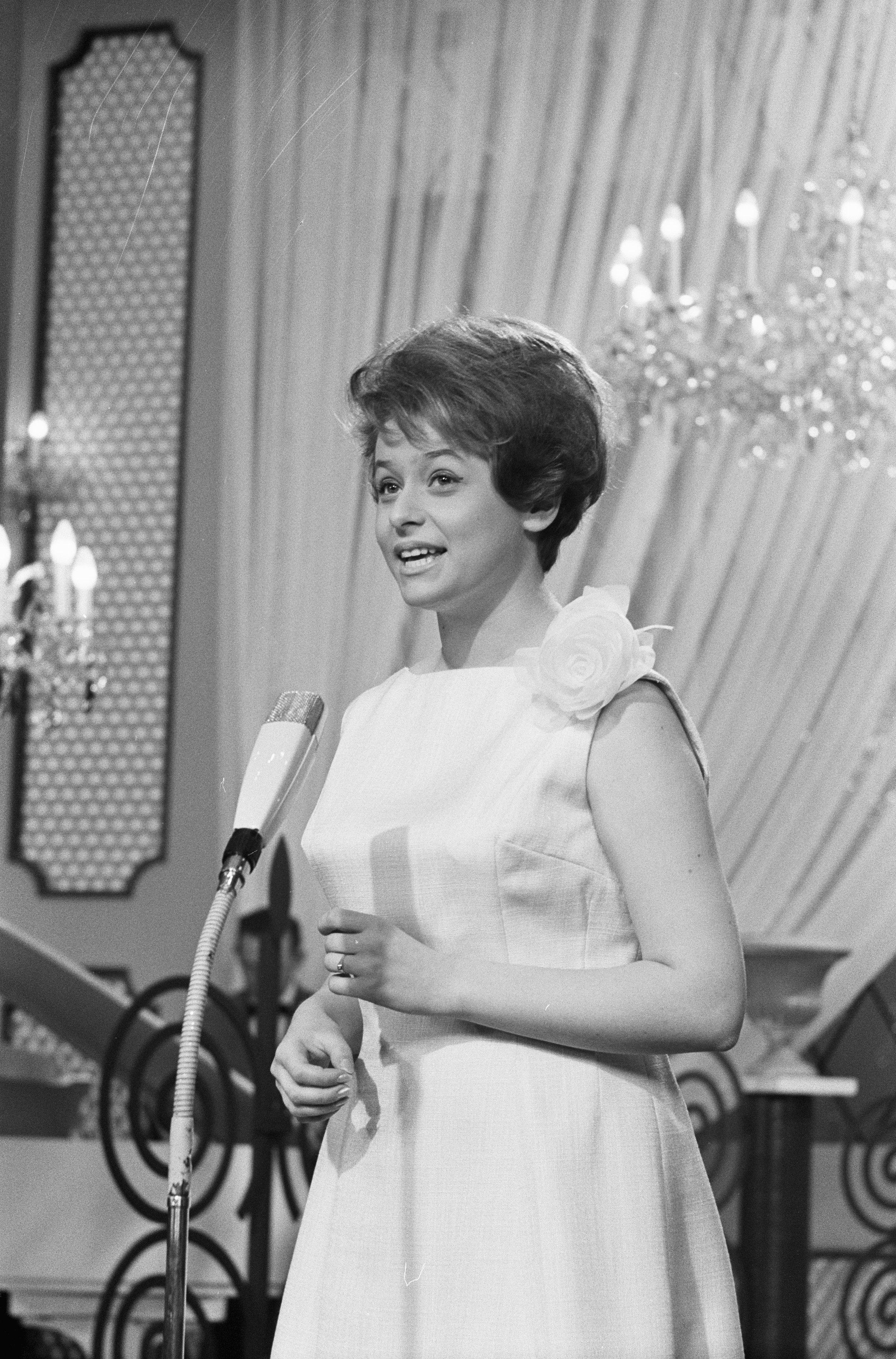 Collectie / Archief : Fotocollectie Anefo Reportage / Serie : [ onbekend ] Beschrijving : Eurovisie Songfestival 1962 te Luxemburg, voor Finland Marion Rung Datum : 18 maart 1962 Locatie : Finland, Luxemburg Trefwoorden : artiesten, songfestivals Persoonsnaam : Rung Marion Fotograaf : Pot, Harry / Anefo Auteursrechthebbende : Nationaal Archief Materiaalsoort : Negatief (zwart/wit) Nummer archiefinventaris : bekijk toegang 2.24.01.05 Bestanddeelnummer : 913-6605